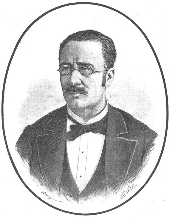 Retrato de Manuel Gil Maestre, en La Ilustració Catalana', obra de Paciano Ross.